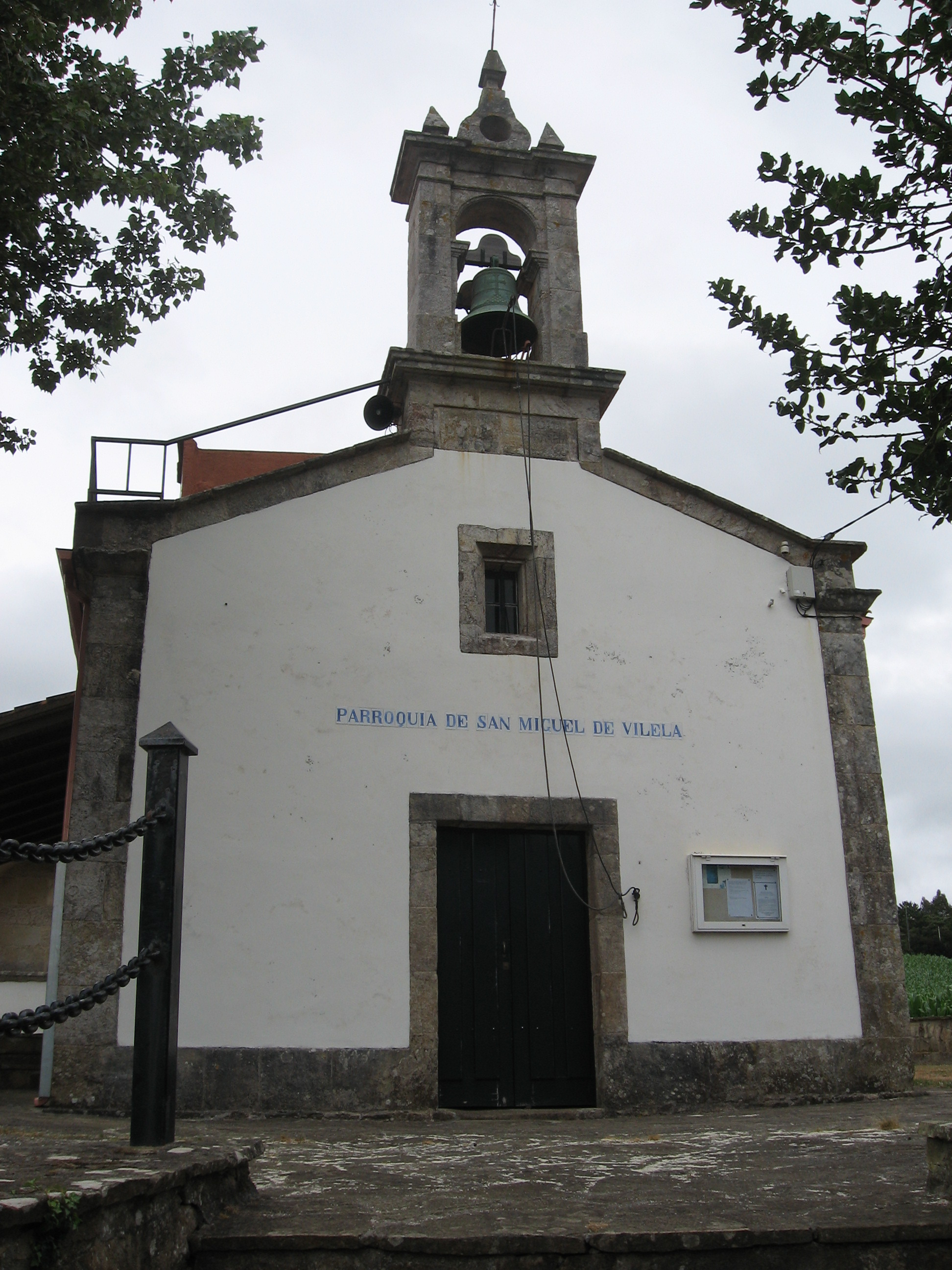 Igrexa Parroquial de Vilela